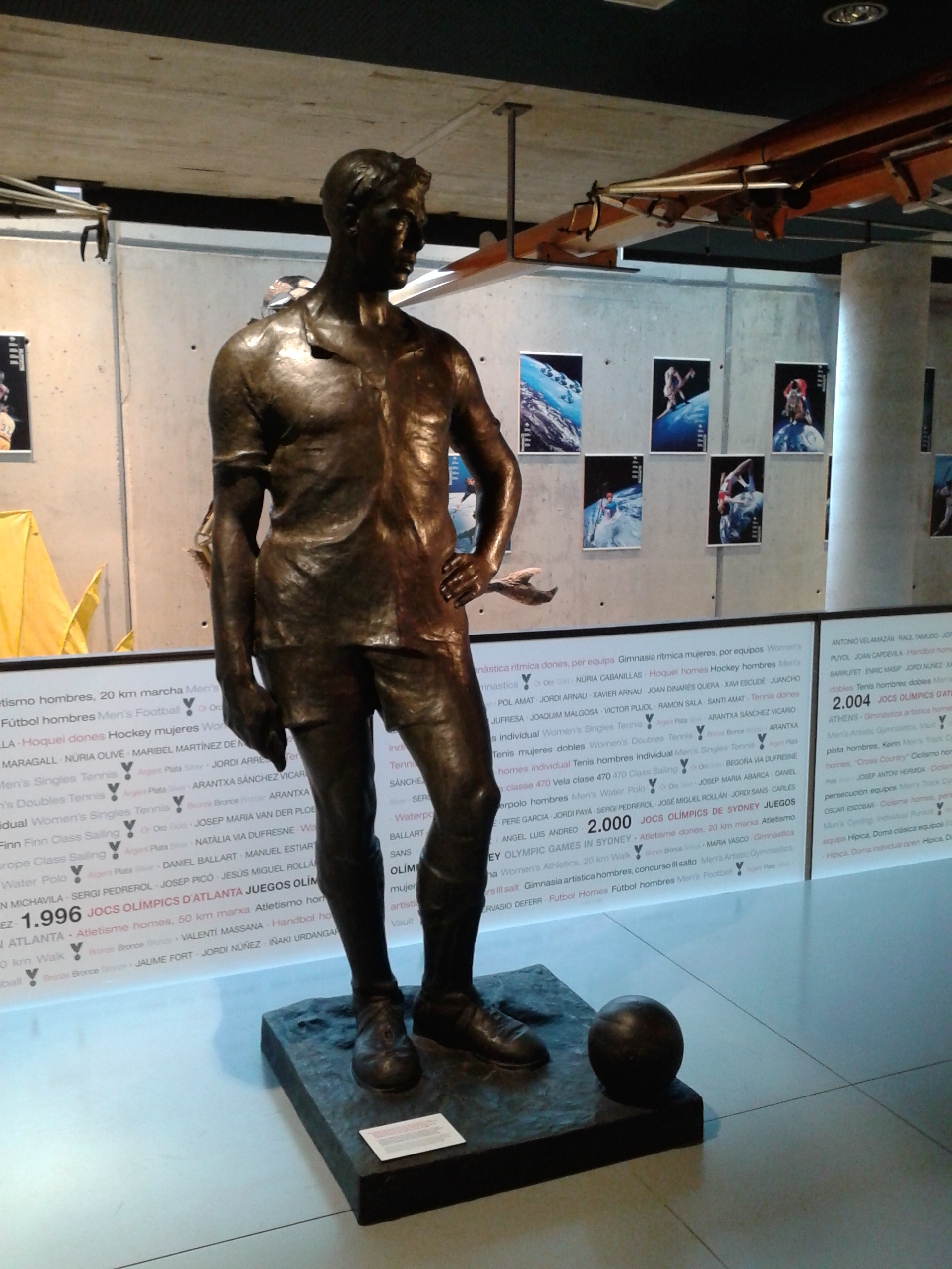 Escultura de Llucià Oslè del futbolista Santiago Massana